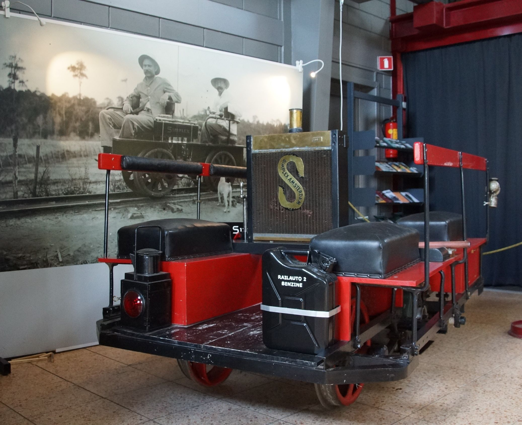 Simplex-Draisine im Schmalspurbahnmuseum in Valkenburg (NL)